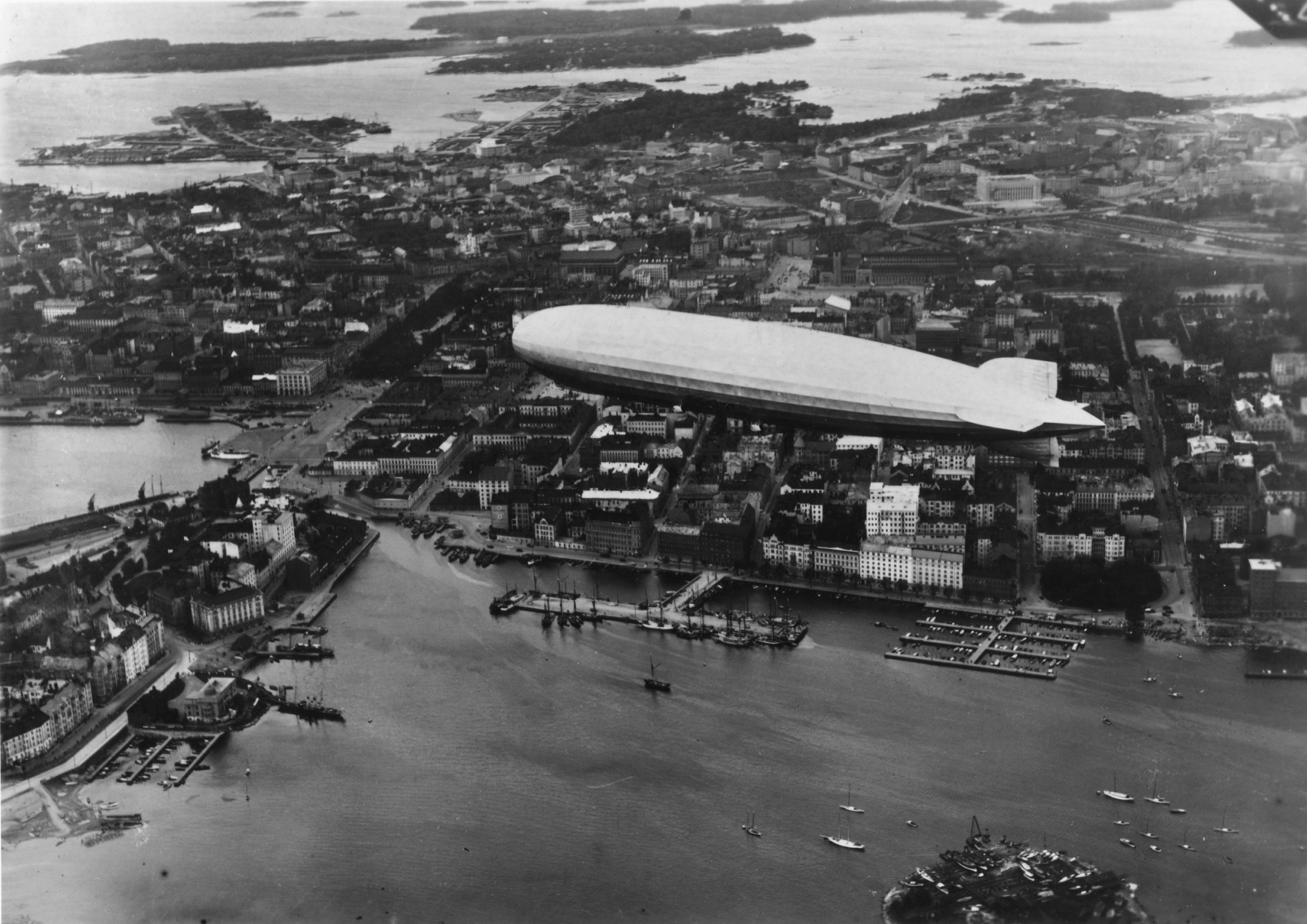 Ilmalaiva Graf Zeppelin Helsingin yllä 24. syyskuuta 1930.